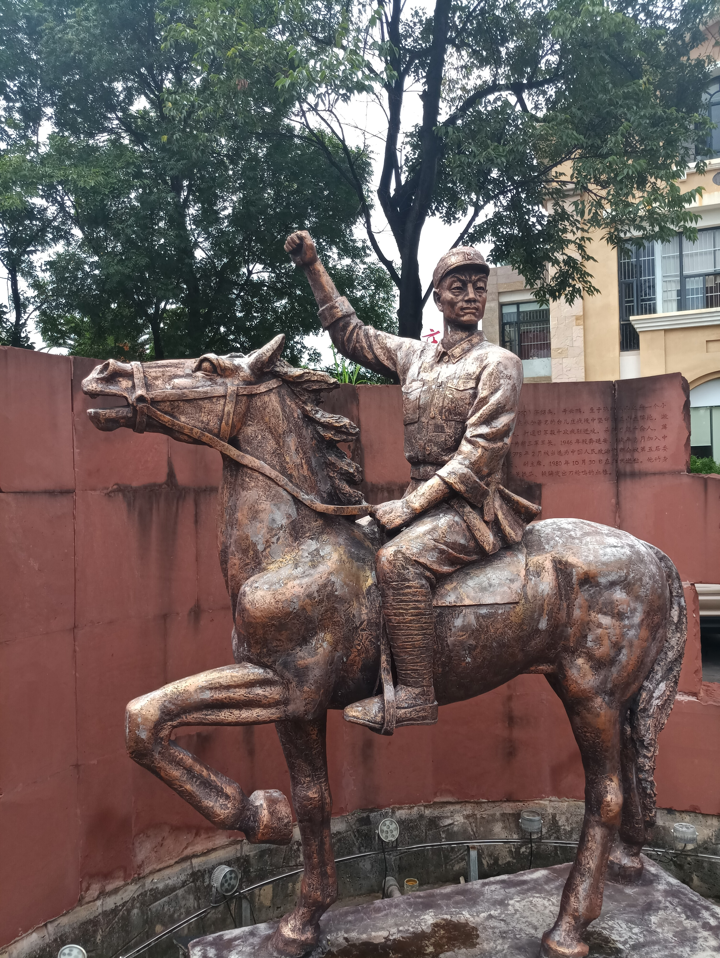 中文（中国大陆）: 弥勒湖泉名人文化园-张冲像